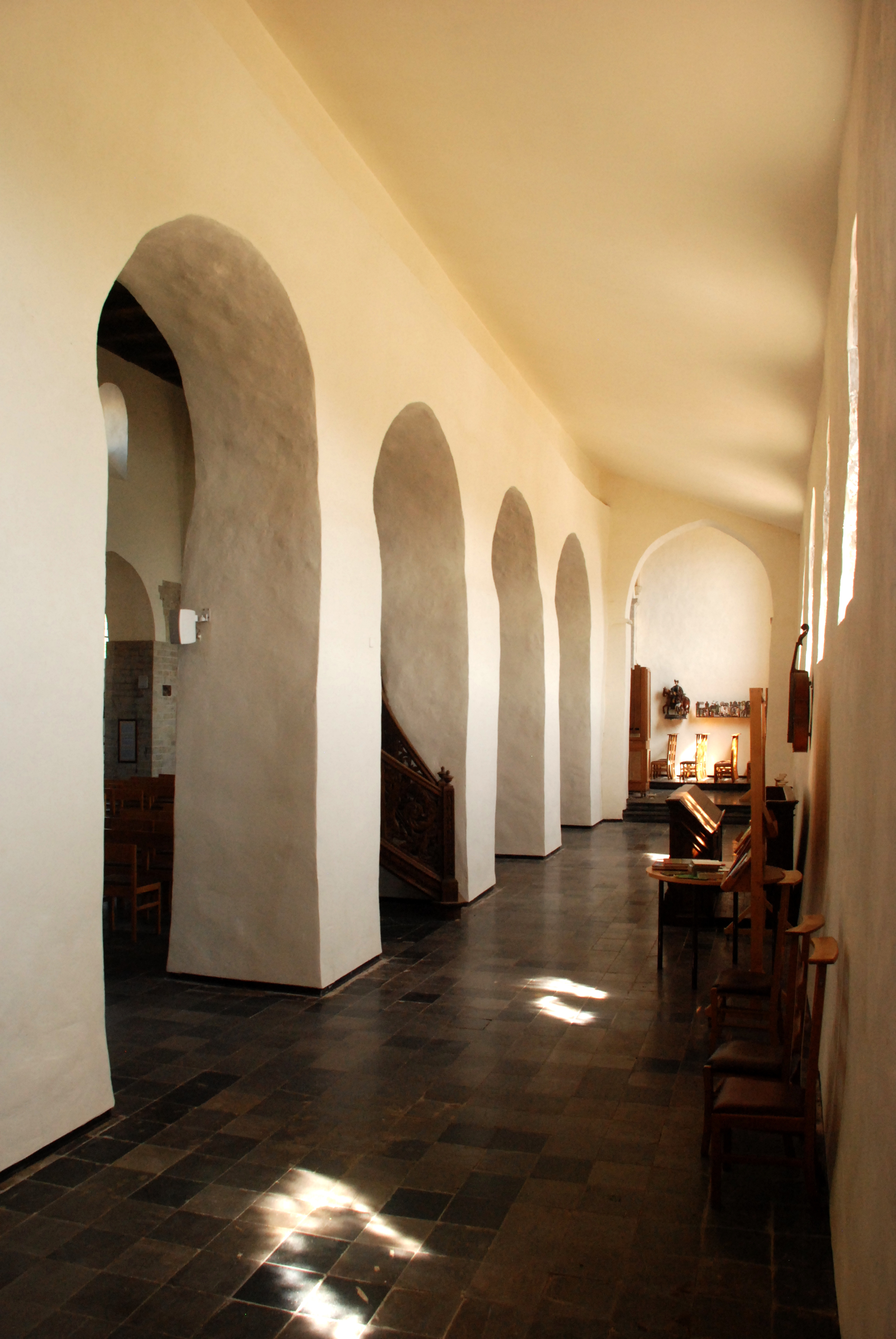 Belgique - Brabant wallon - Église Saint-Martin de Tourinnes-la-Grosse